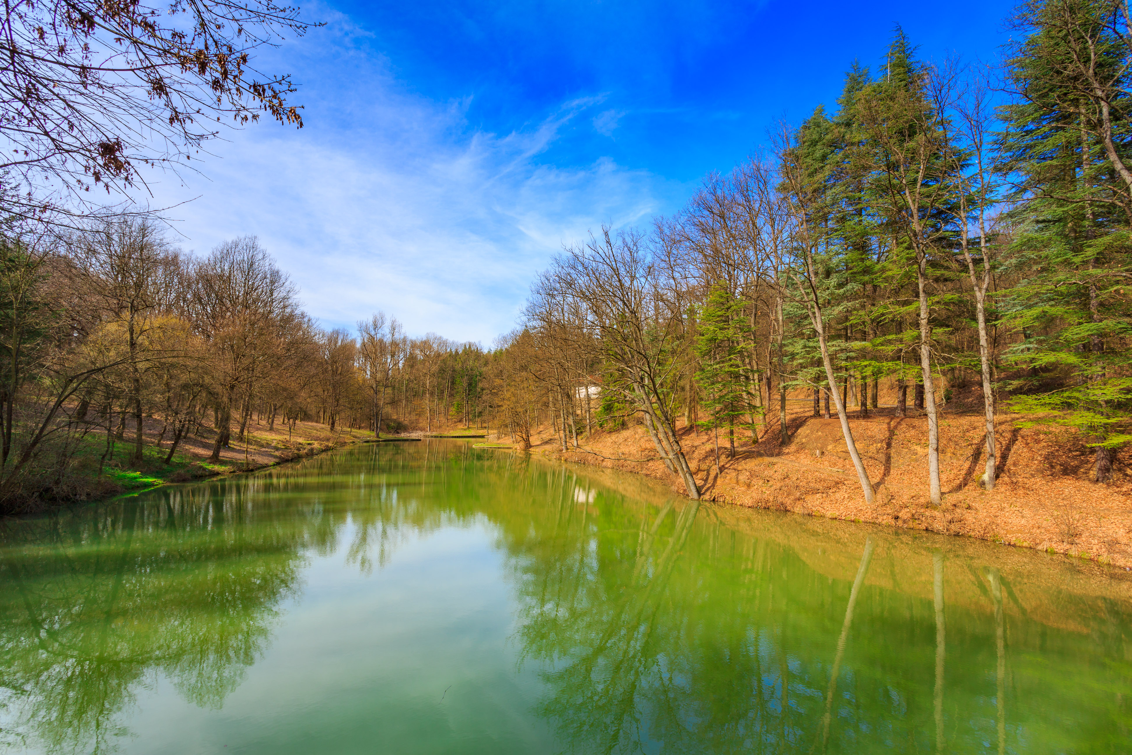 Ово је фотографија заштићеног природног добра у Србији под шифром: ПИО01This is a a photo of a natural area in Serbia with ID: ПИО01 Језеро Трешња